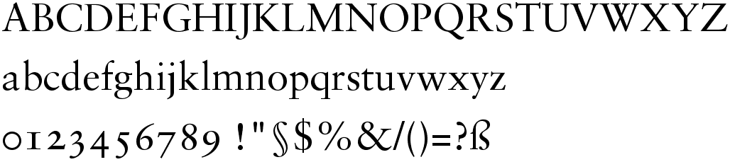 schriftartenmuster der sabon – selbst erstellt.